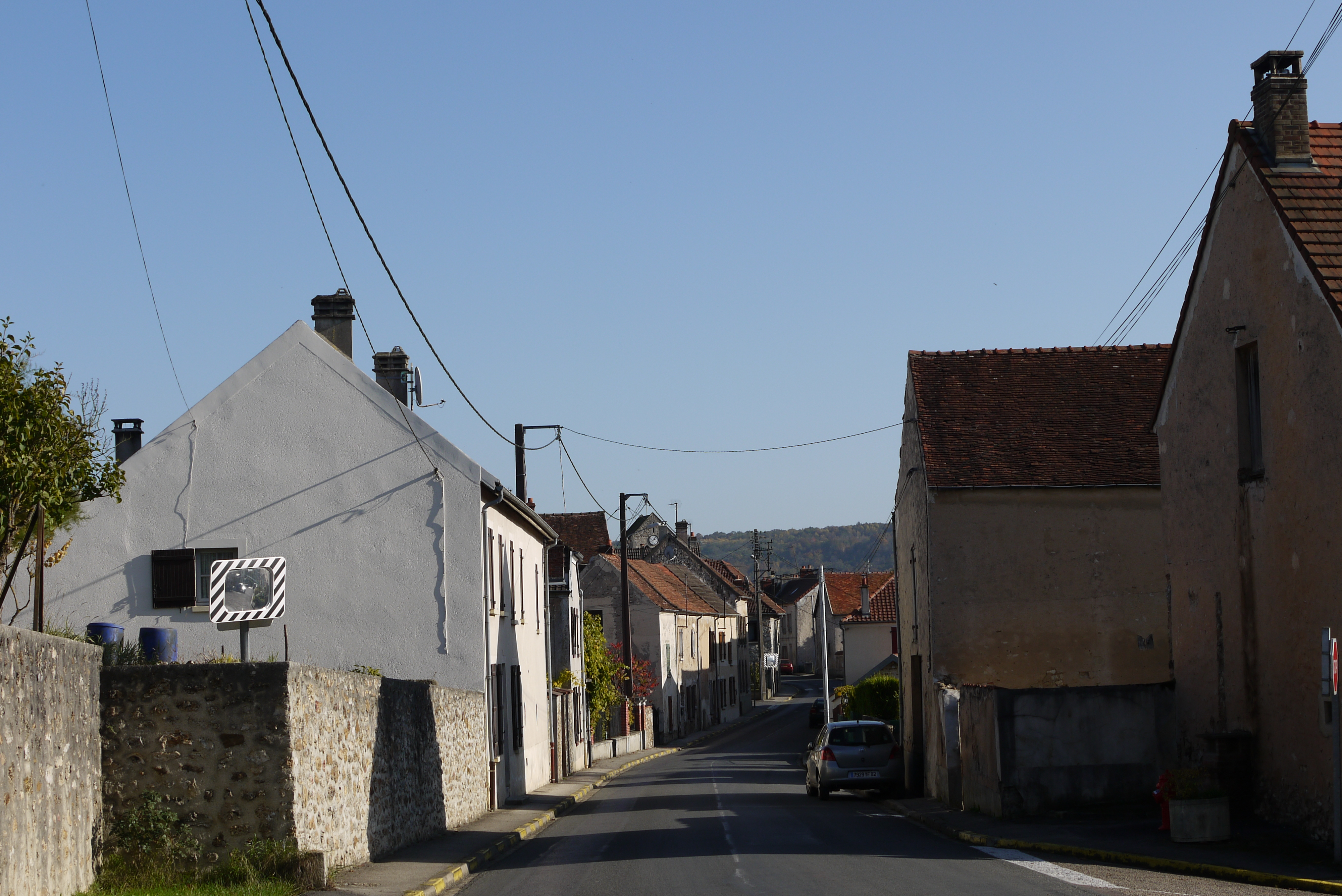 Chartèves, rue principale